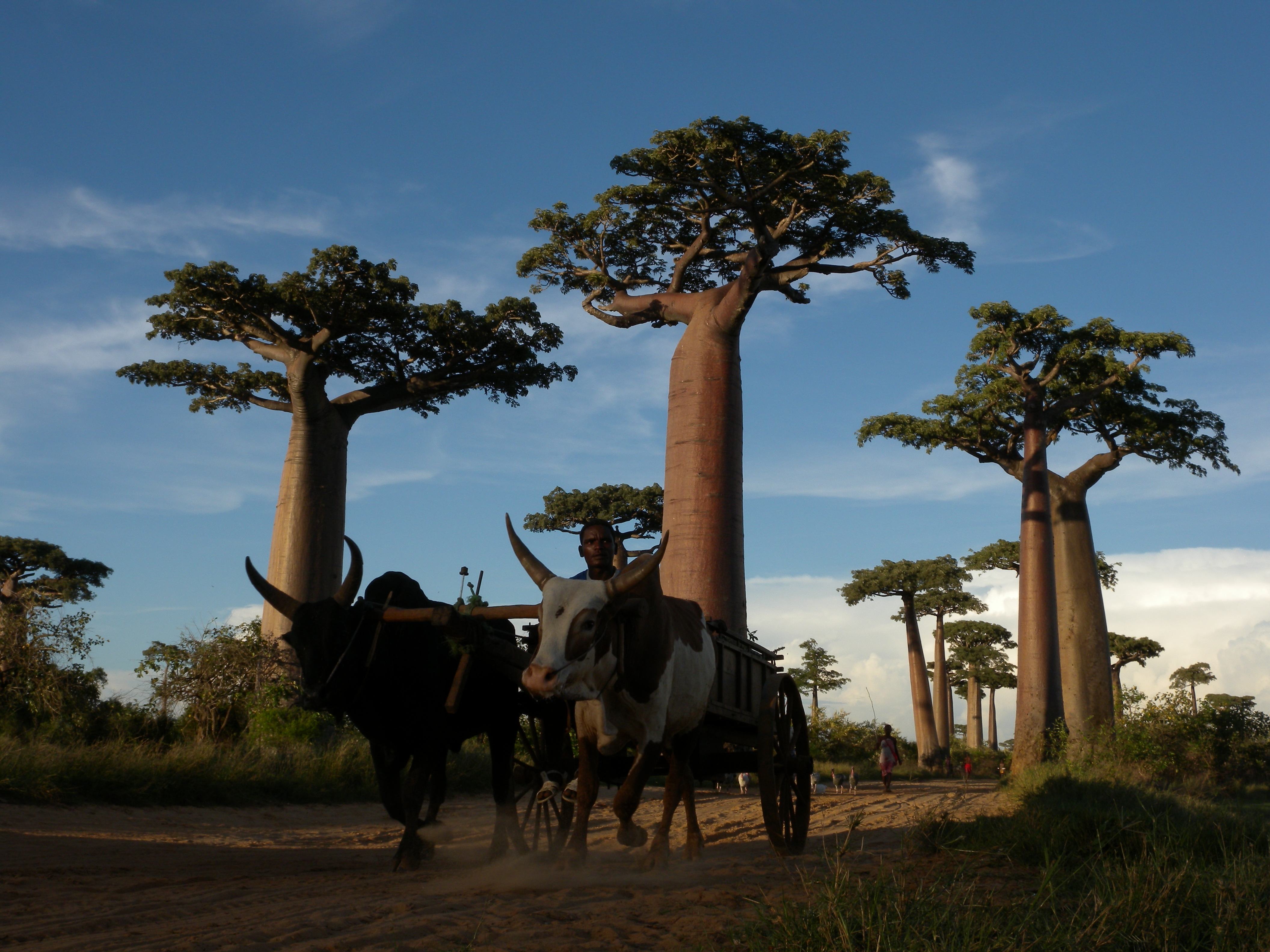 Allée des Baobabs near Morondava, Madagascar